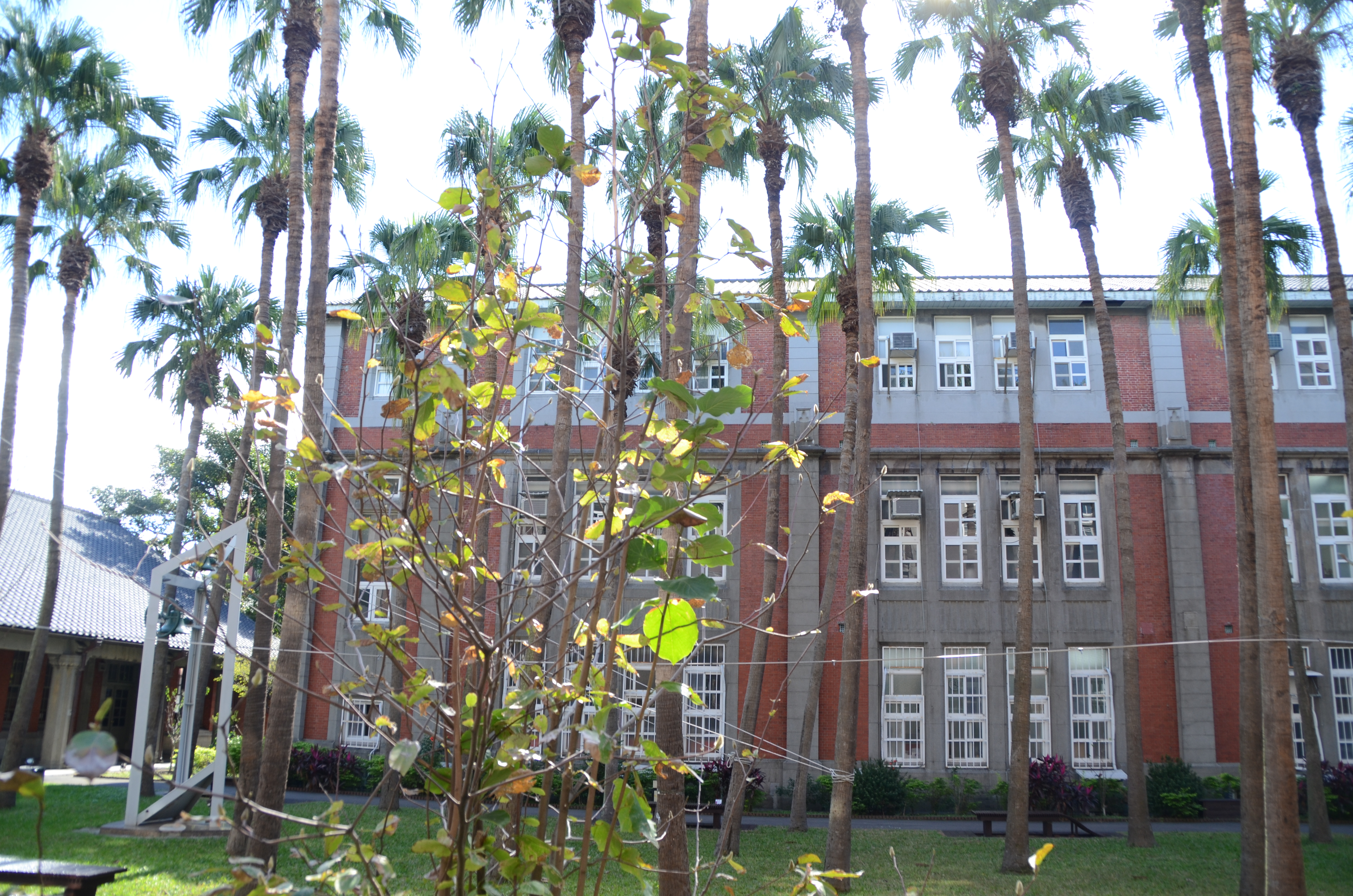 臺灣師範大學原高等學校校舍.講堂